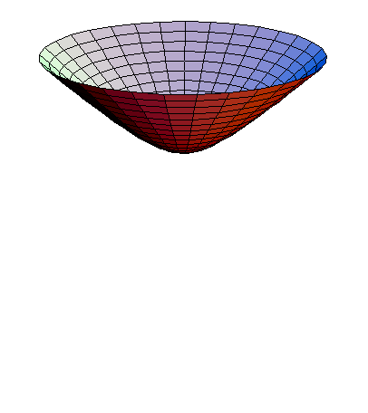 Powłoka hiperboloidy dwupowłokowej